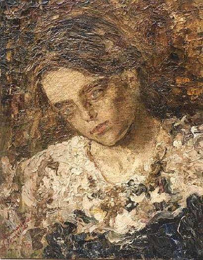 "Testa di ragazza", olio su tela, 50 x 40 cm., firmato